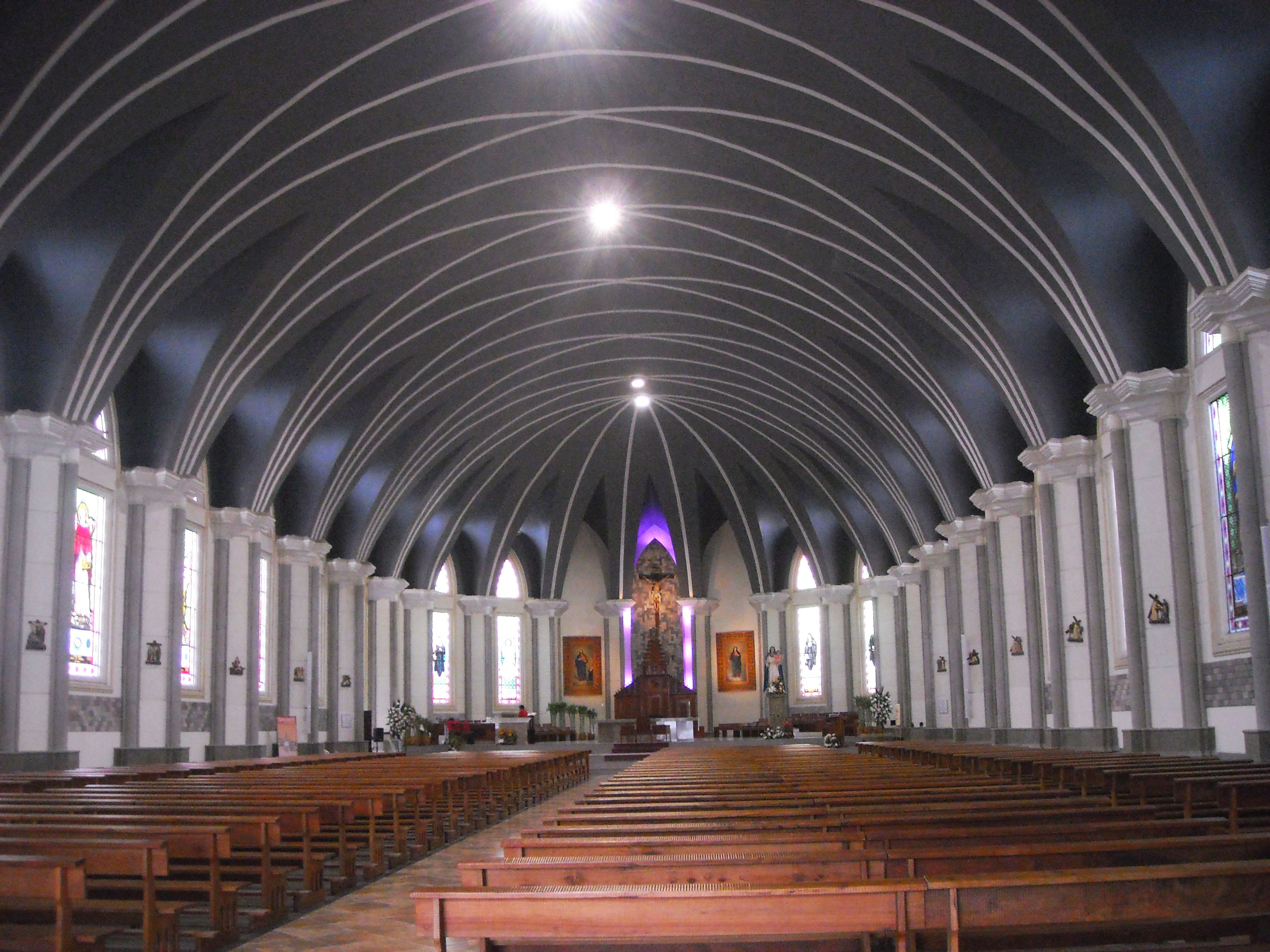 Interior de la catedral El Buen Pastor, en Santo Domingo, Ecuador (2011).